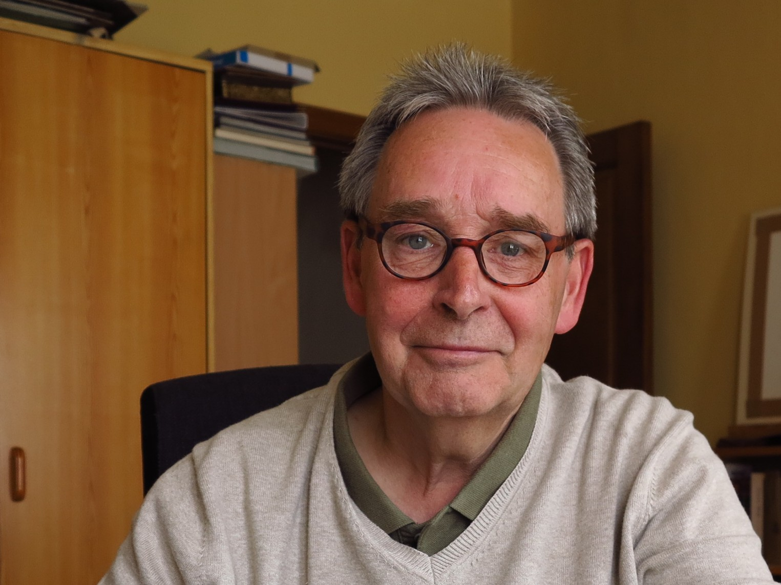 Pieter Dewever